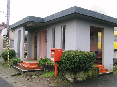 2005年3月27日に投稿者が竹中駅にて撮影。